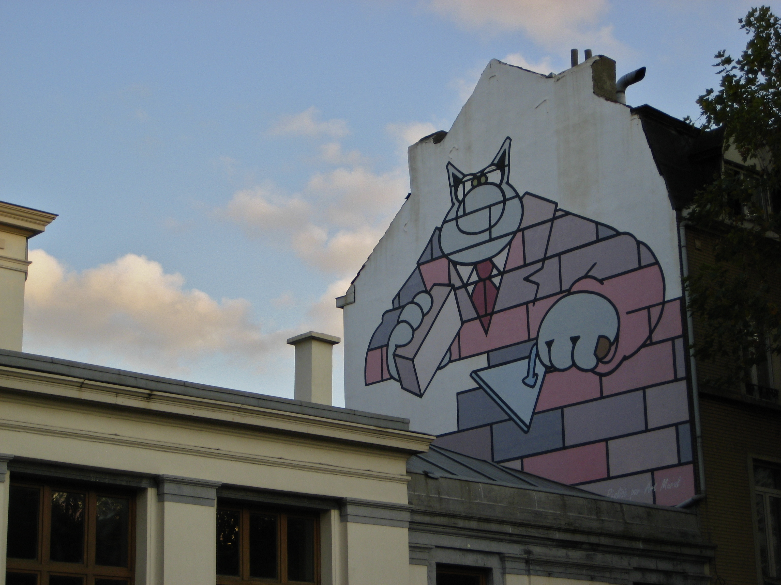 Stripmuur De Kat te Brussel.